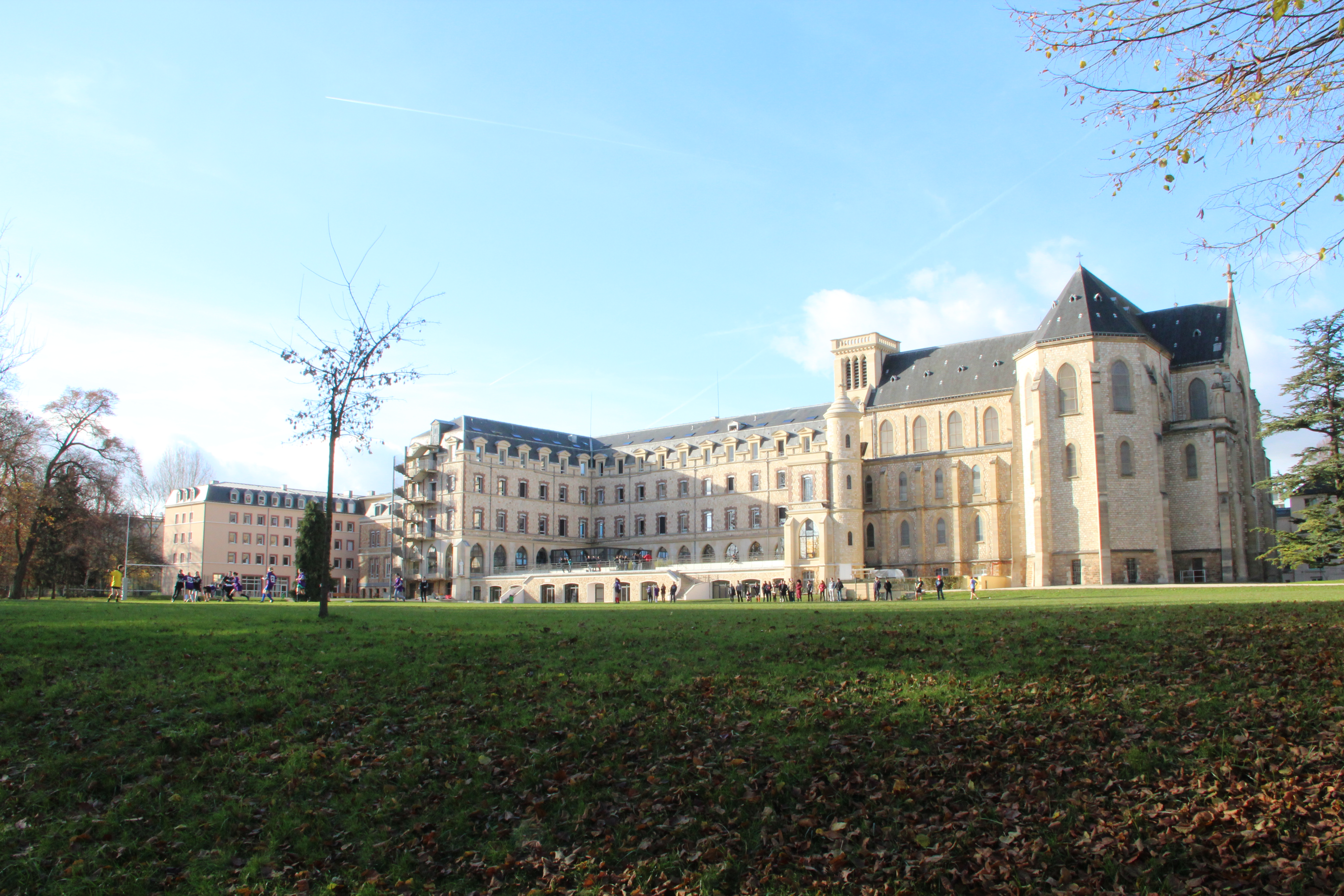 Bâtiment Notre-Dame et Chapelle depuis le terrain de rugby du Lycée Sainte-Geneviève à Versailles